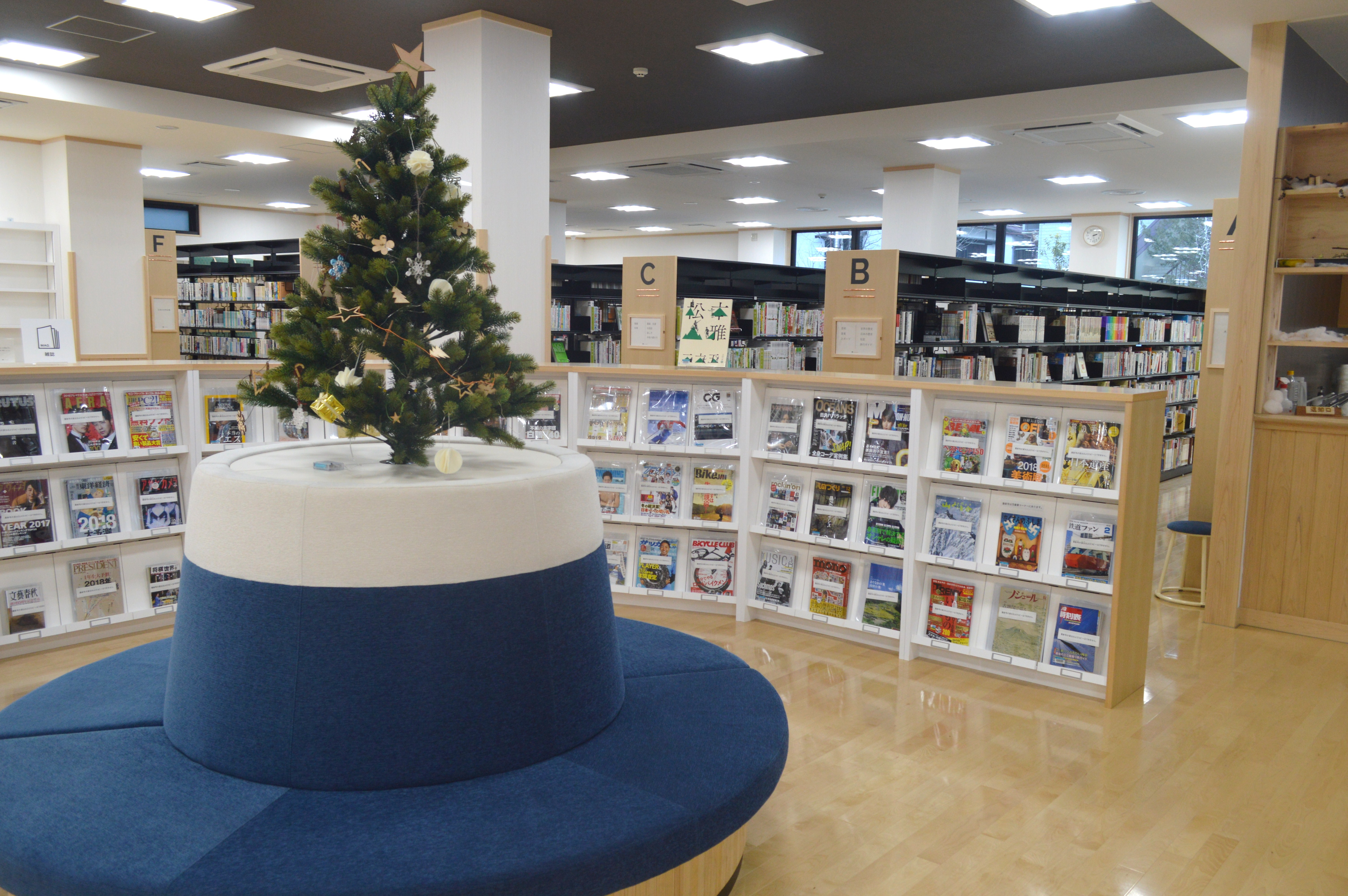 長野県木曽郡木曽町の木曽町図書館。